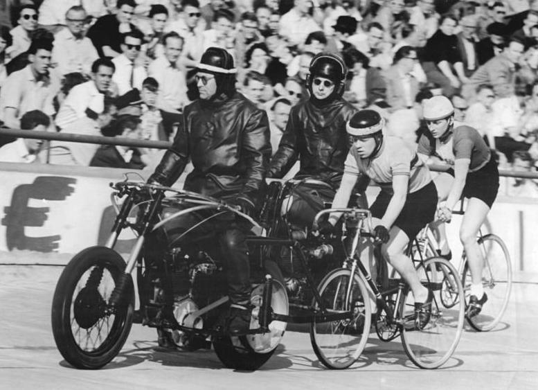 G. Barandat, M. Klieme Zentralbild Wen-Bey 1.6.1958 Bey-L Berliner Meisterschaft der Bahnfahrer Am Sonntag, dem 1.6.1958 wurde auf der Radrennbahn in Berlin-Weißensee die Berliner Bahnmeisterschaften entschieden. UBz: Während des Meisterschaftslaufes der Steher hinter Motoren über 50 km. Barandat hinter Schrittmacher Schopenhauer wird von Klieme (Dynamo) hinter Schrittmacher Buder (rechts dahinter) angegriffen.